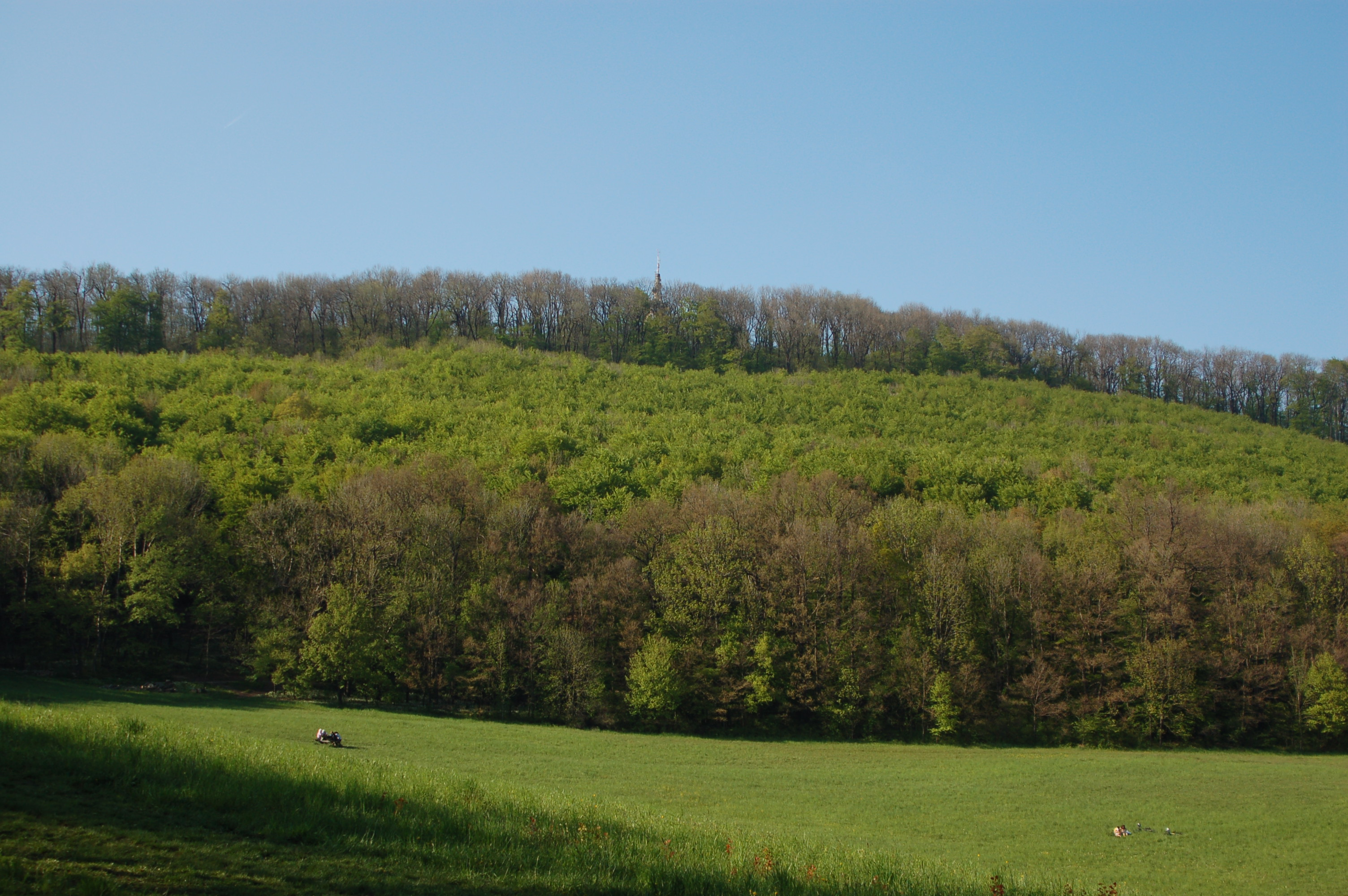 Hermannskogel von der Rohrerwiese